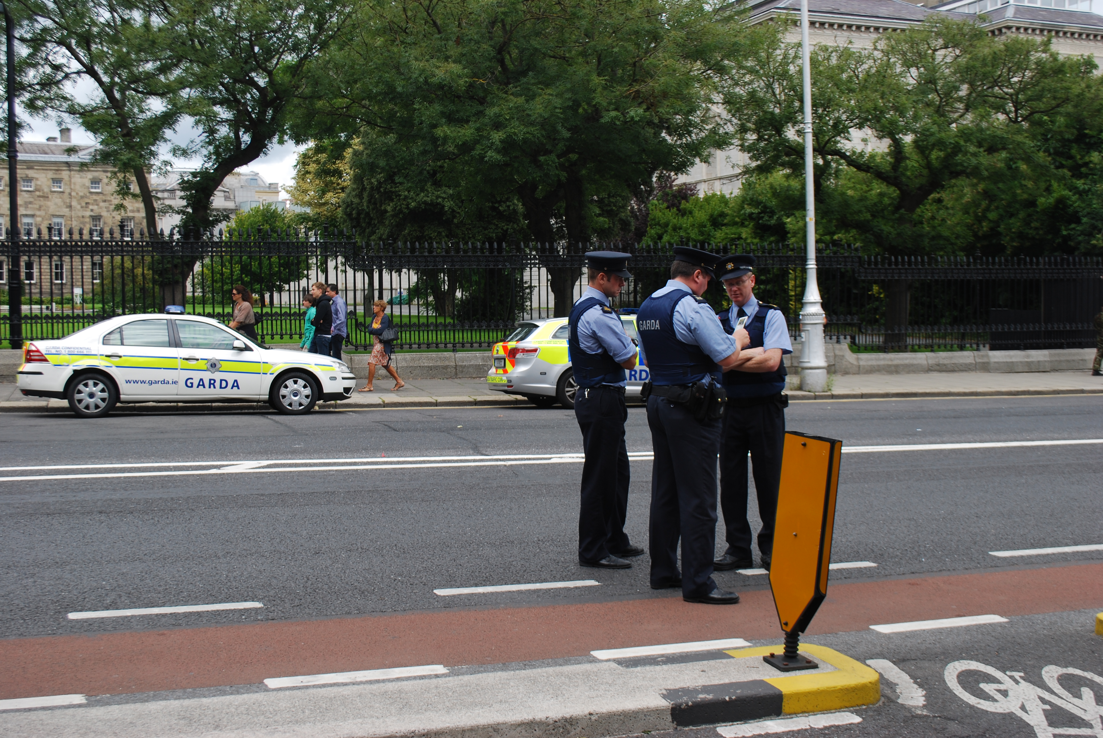 Relève de la garde au Mémorial National des Forces de Défense à Dublin (10 août 2013).